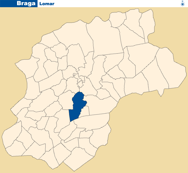 Localização de Lomar no concelho de Braga.